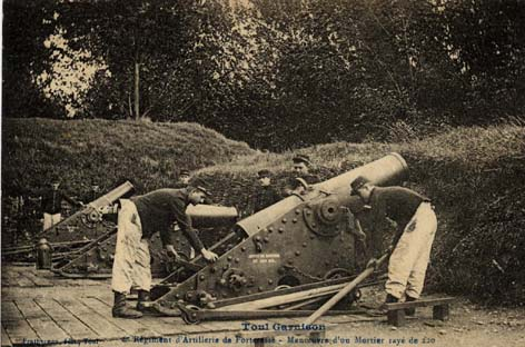 French 220-mm de Bange mortars, Toul garrison, France